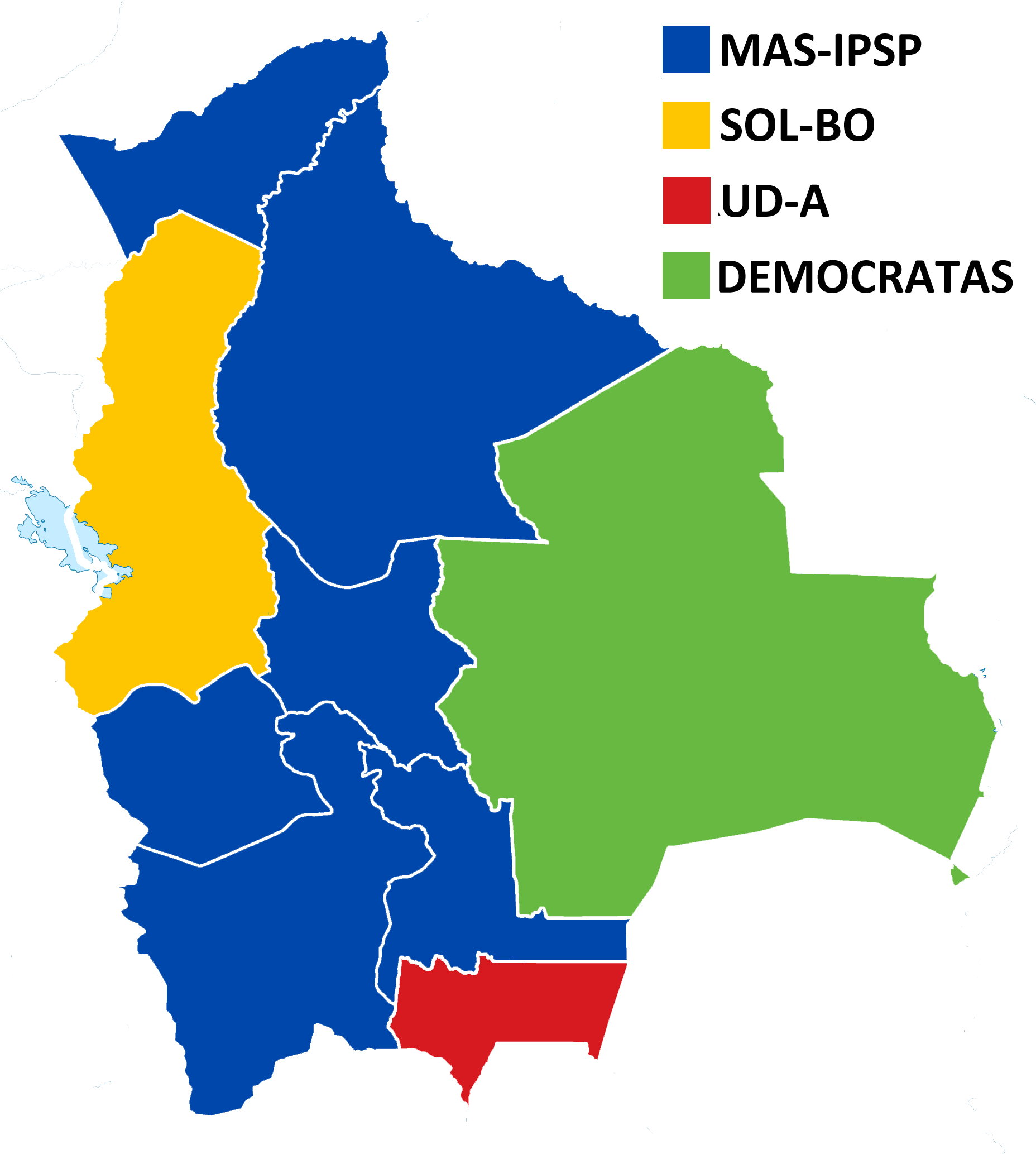 Vencedor por departamento en las elecciones de gobernadores departamentales de Bolivia de 2015: Azul: MAS-IPSP; Verde: Movimiento Demócrata Social; Rojo: Unidad Departamental Autonomista; Amarillo: Soberanía y Libertad (Sol-Bo)